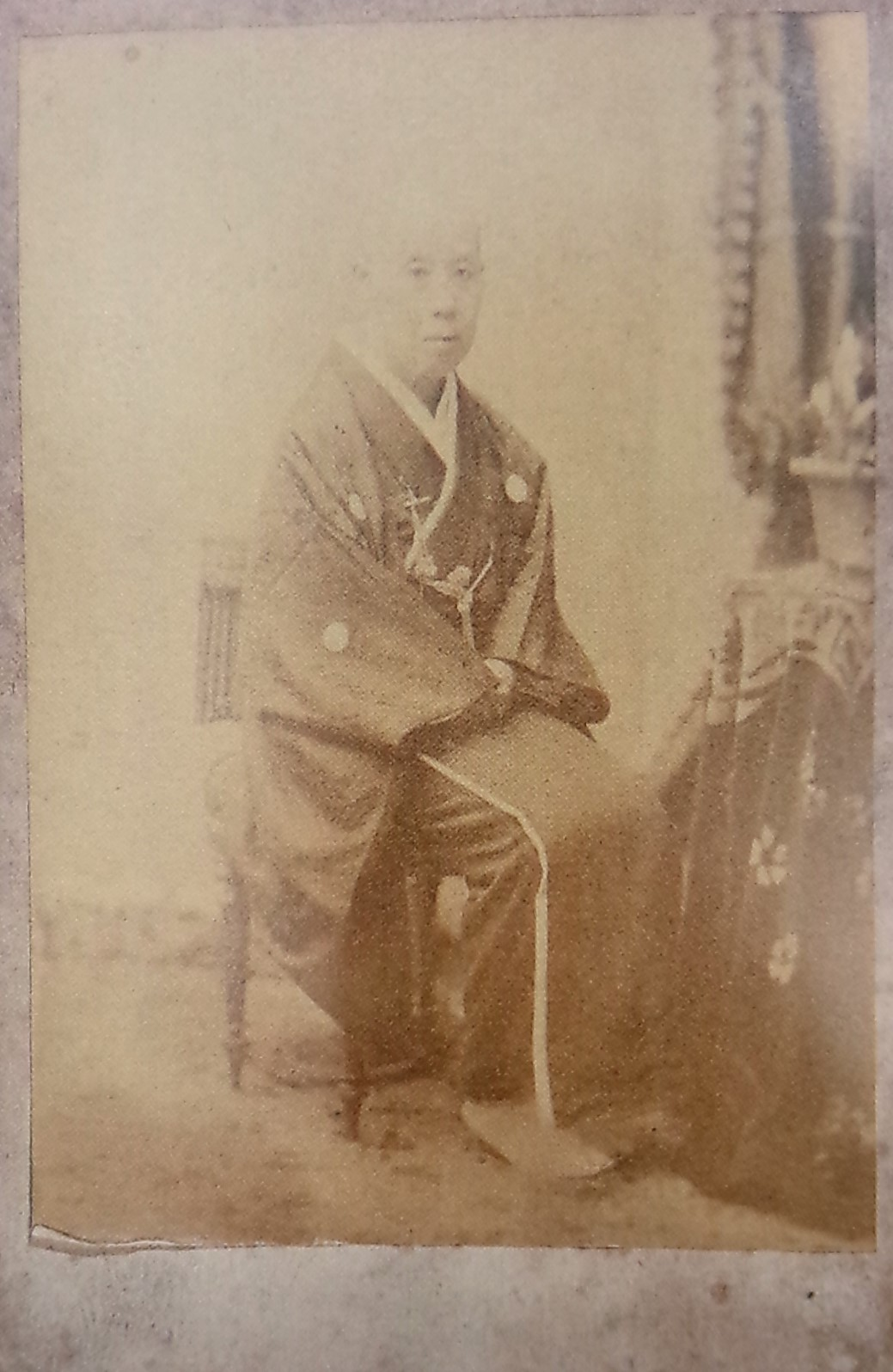 実成院(徳川家茂の生母)の肖像写真。